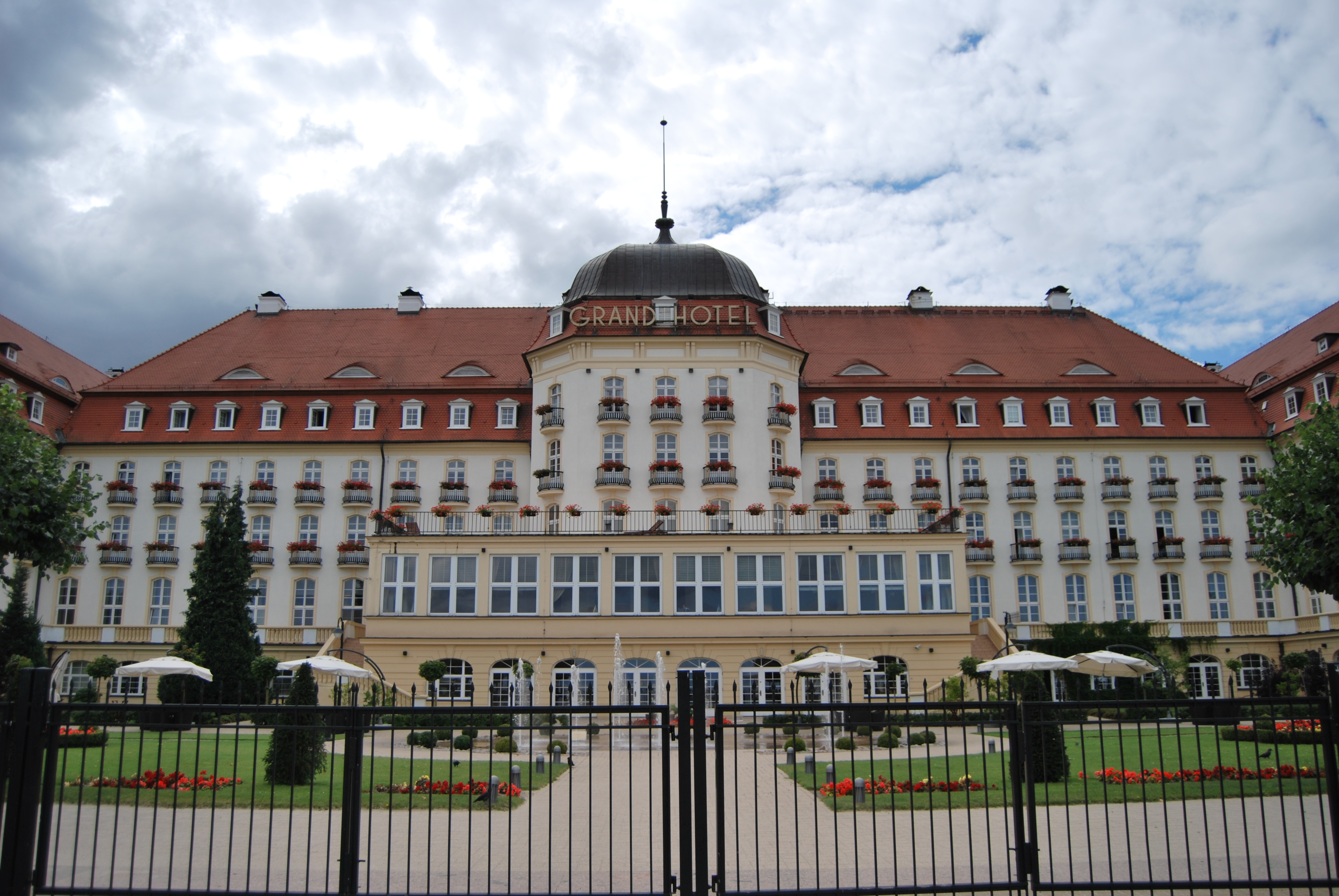 Sopot, hotel kasyna gry GRAND HOTEL, 1927